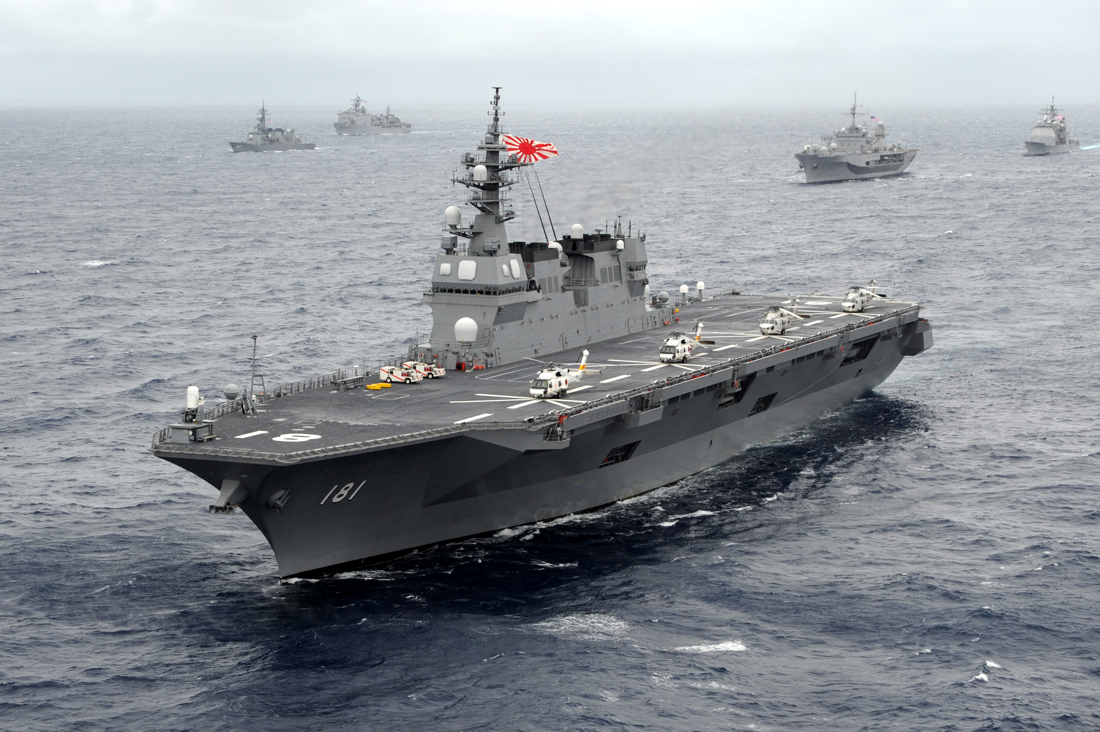 DDH-181 ひゅうが